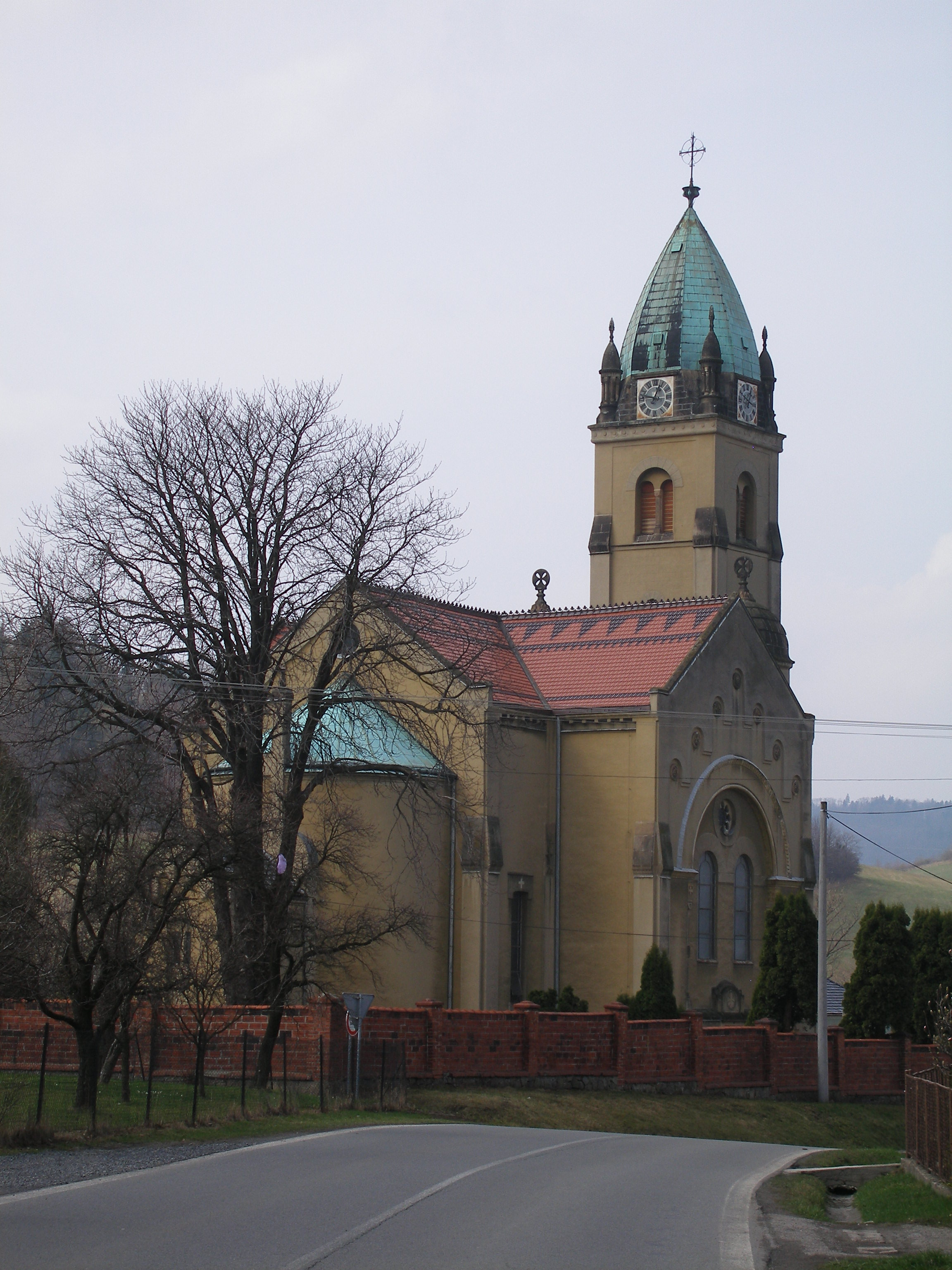 Kostel Božského Srdce Páně v Hodslavicích (pohled od východu).